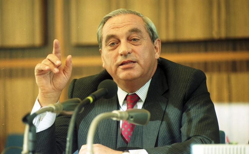 Bonn, 9. Februar 1990 Der Präsident der Deutschen Bundesbank, Karl Otto Pöhl, äußerte sich vor der Bundespressekonferenz zu dem Beschluß der Bundesregierung, eine Währungsunion mit der DDR anzustreben.